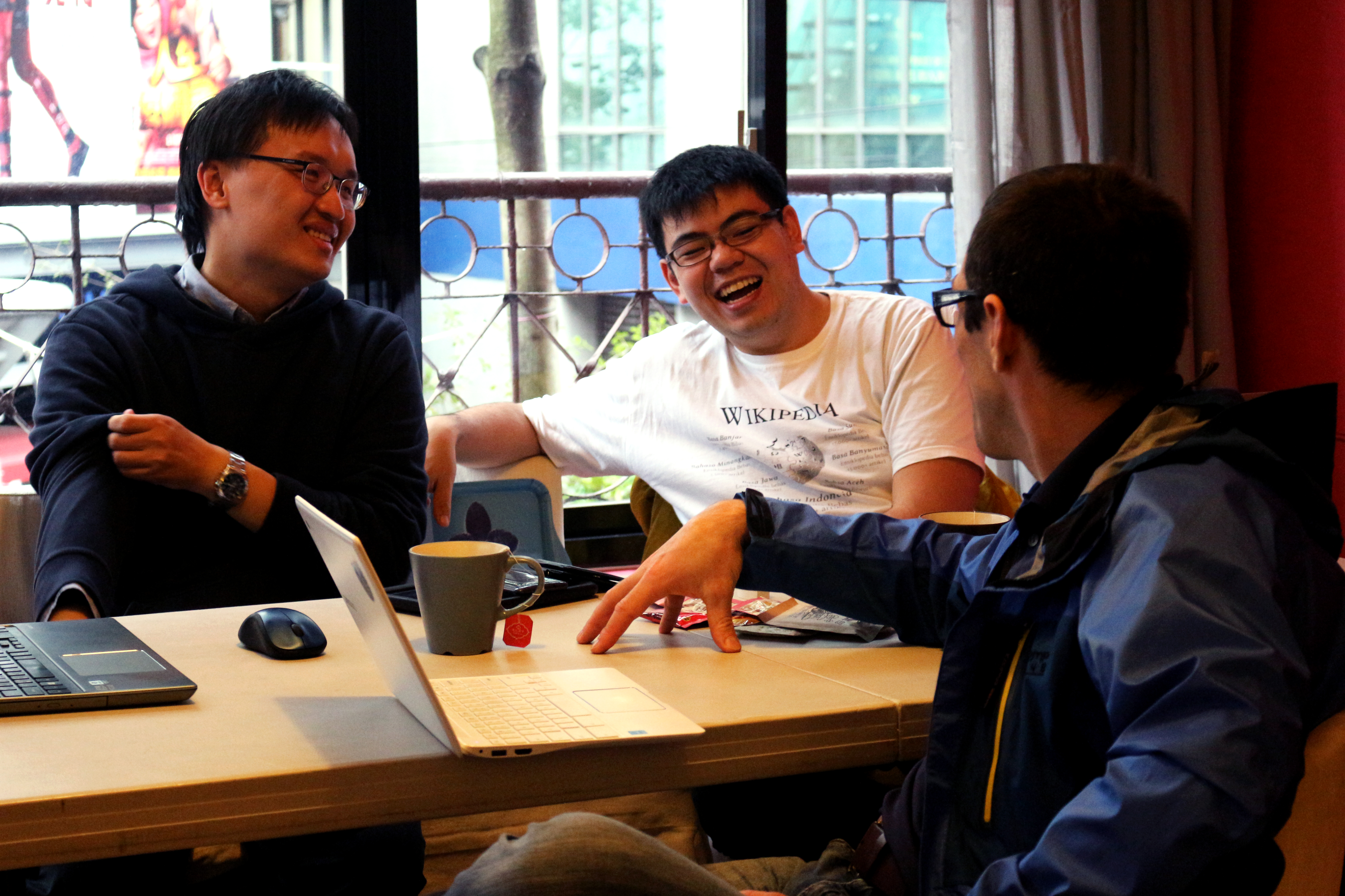 中文（台灣）: 三年前，有位兼具醫師身分的加拿大維基人Dr. James Heliman發起了國際醫學條目翻譯計畫。如今Dr. James行經台灣，以一位醫者和開放資源貢獻者的角度，向台灣維基人分享他從零到一「無國界譯者」的歷程，目的就是希望能激發台灣開放社群及醫學專業者彼此間的合作交流；透過中華民國維基媒體協會與Dr. James的對談，讓許多維基百科的愛用者都再次意識到，知識的力量來自眾人的付出與智慧，而台灣從來不嫌多一個關注付諸行動的夥伴。